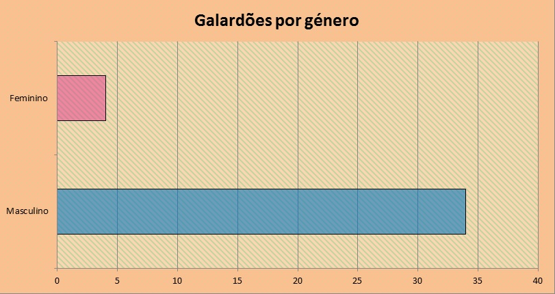 Gráfico que mostra a distinção entre os géneros na entrega do prémio.